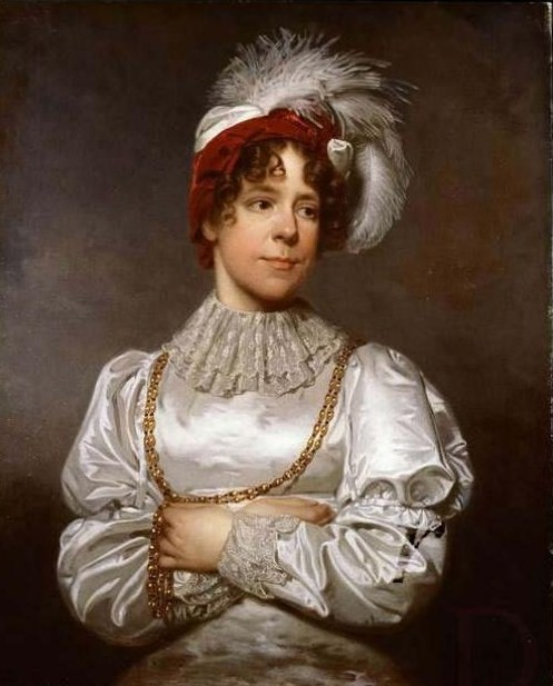 Portret van prinses Louise van Oranje-Nassau (overleden 1819).